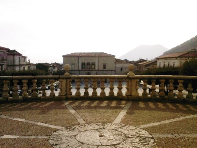 particolare del sagrato della Collegiata di san Martino (Cerreto Sannita-Bn)